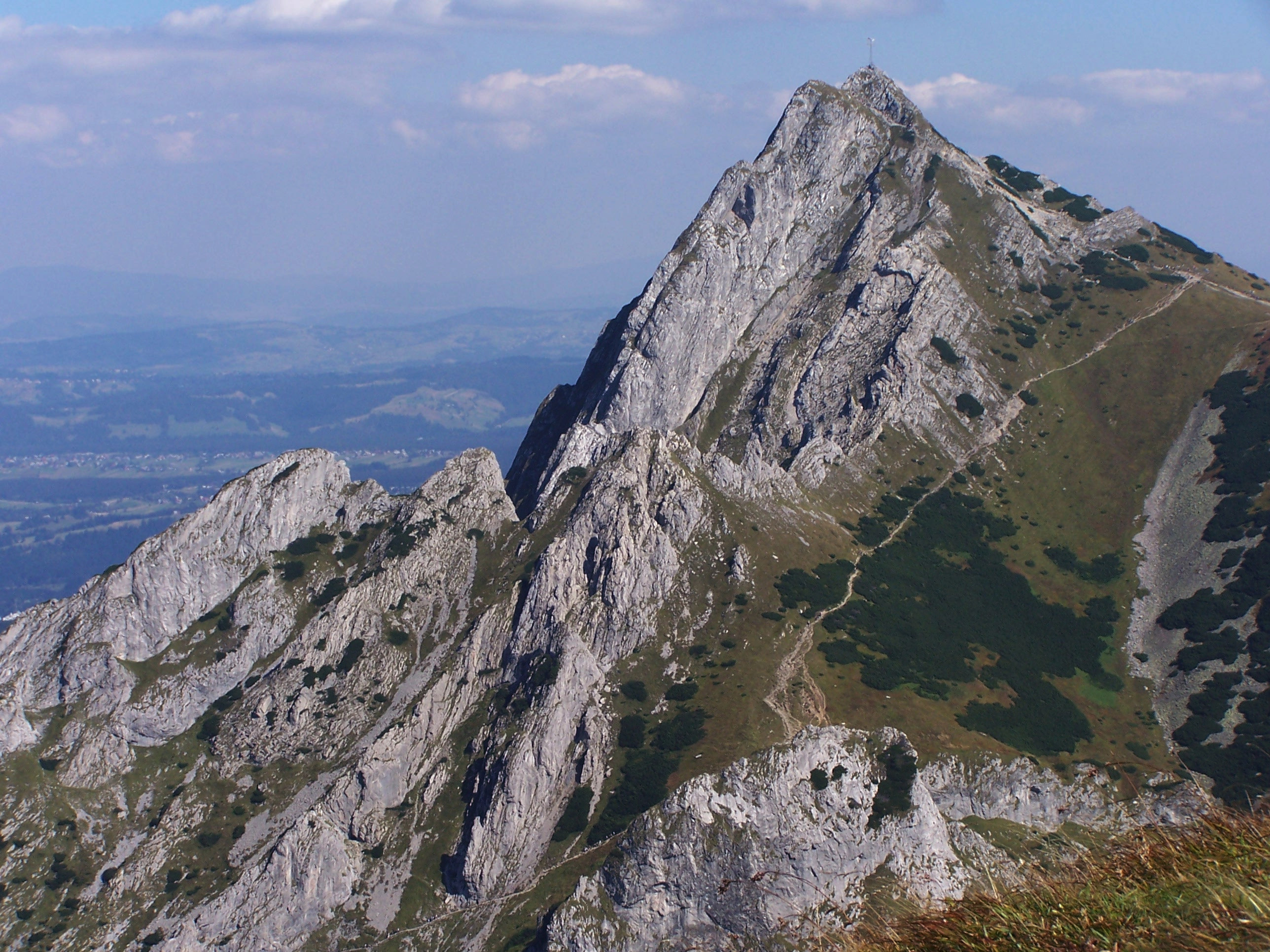 Giewont, Giewoncka Przełęcz, Mały Giewont